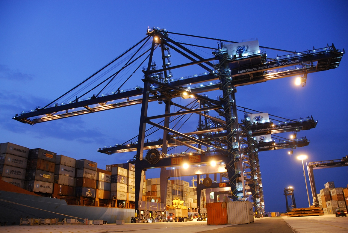 Terminal Especializada de Contenedores